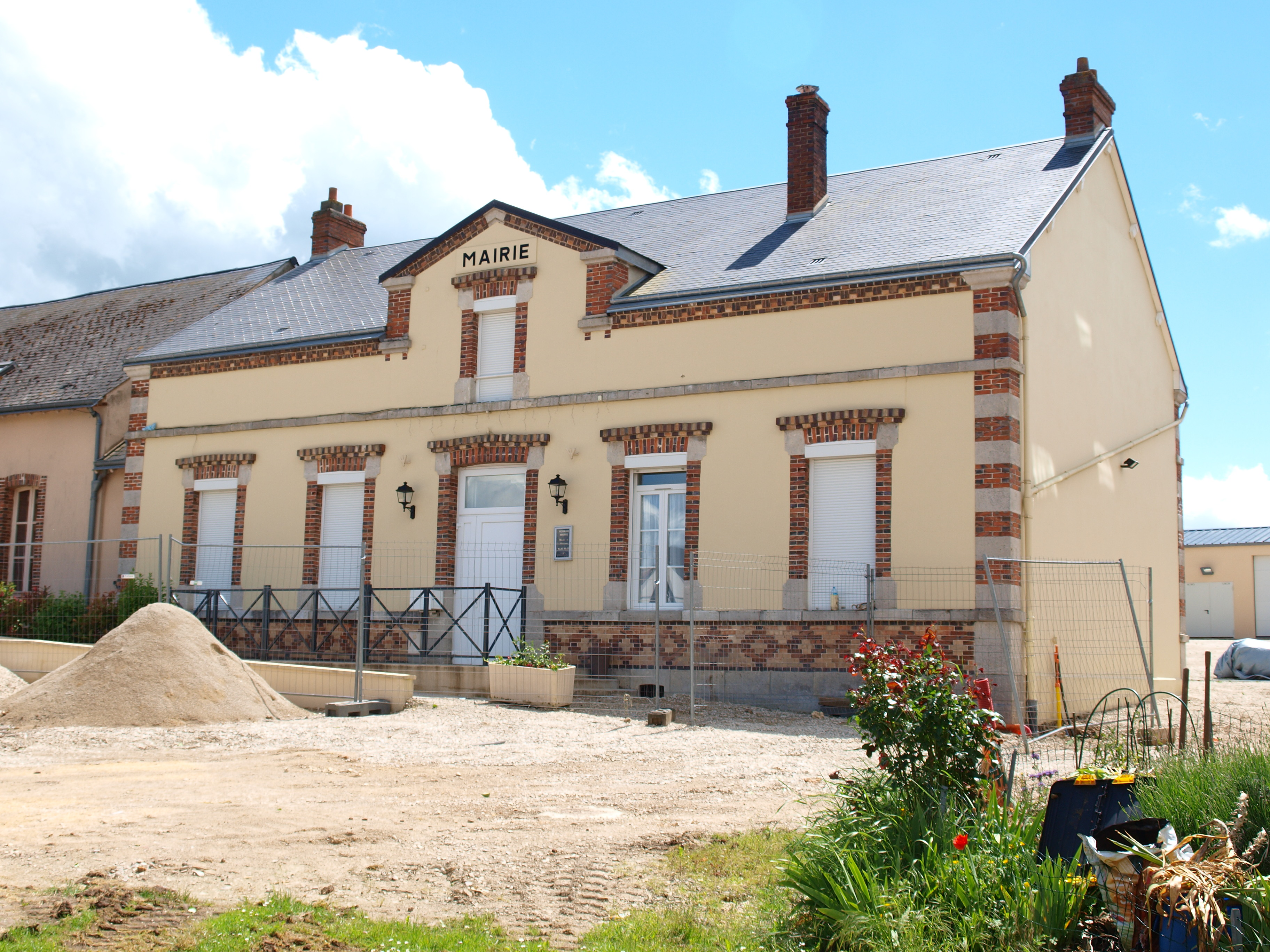 Roinville-sous-Auneau